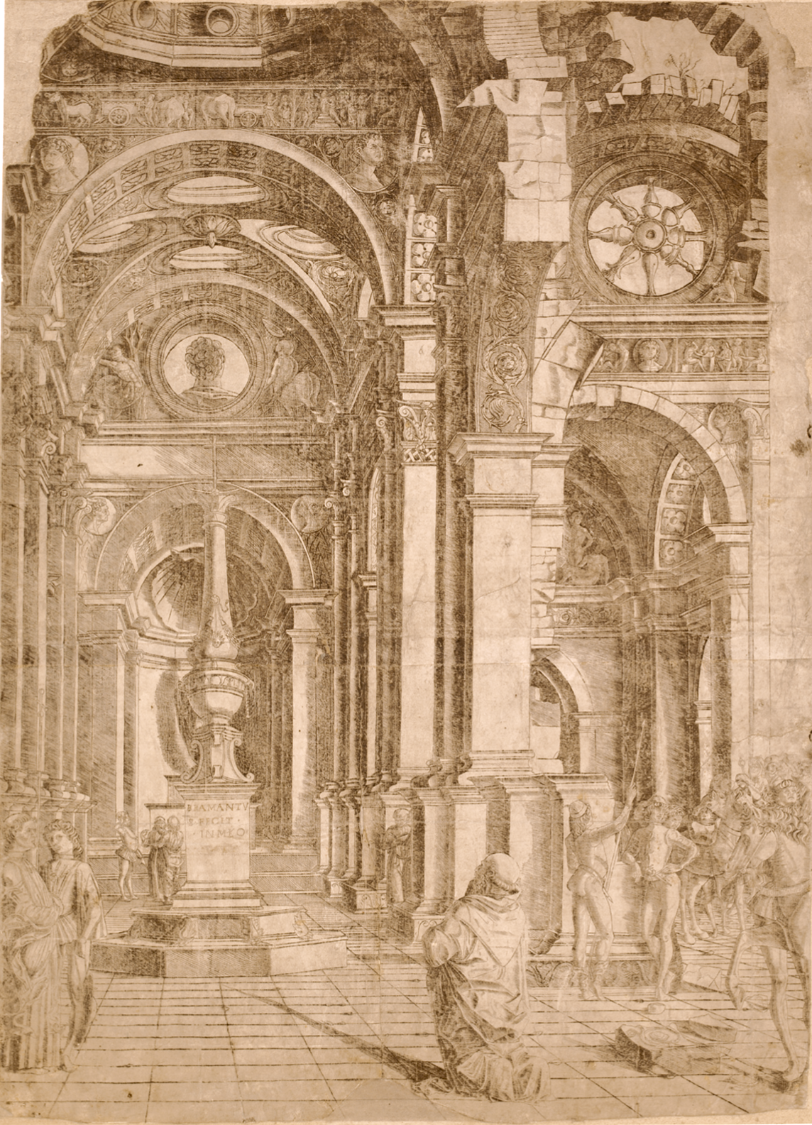 Gravure Prevedari d’après d’un dessin sur papyrus de Bramante